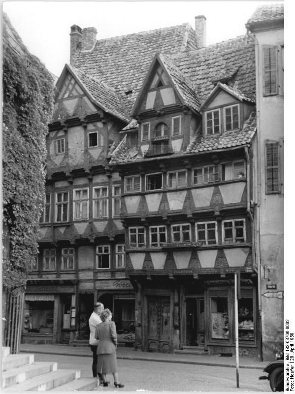 Quedlinburg, Fachwerkhäuser am Markt Zentralbild Hoefer 28.4.1959 Quedlinburg Am Markt. Copyright by Foto Hoefer Berlin-Weißensee, Streustr. 46 Mitglied im Verbanf der Deutschen Presse Postscheck Berlicn NW, N 48364 Tel.563410